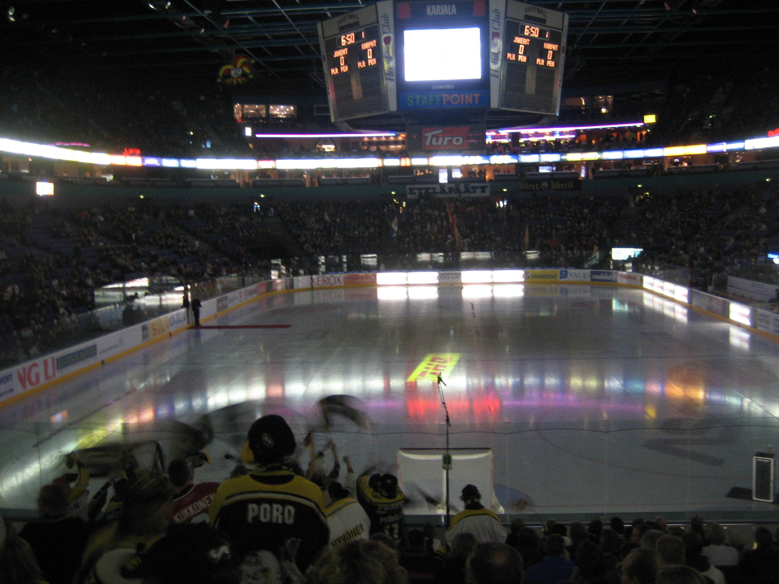 Hartwall Areena ennen kauden 2006–2007 toisen finaalin alkua.